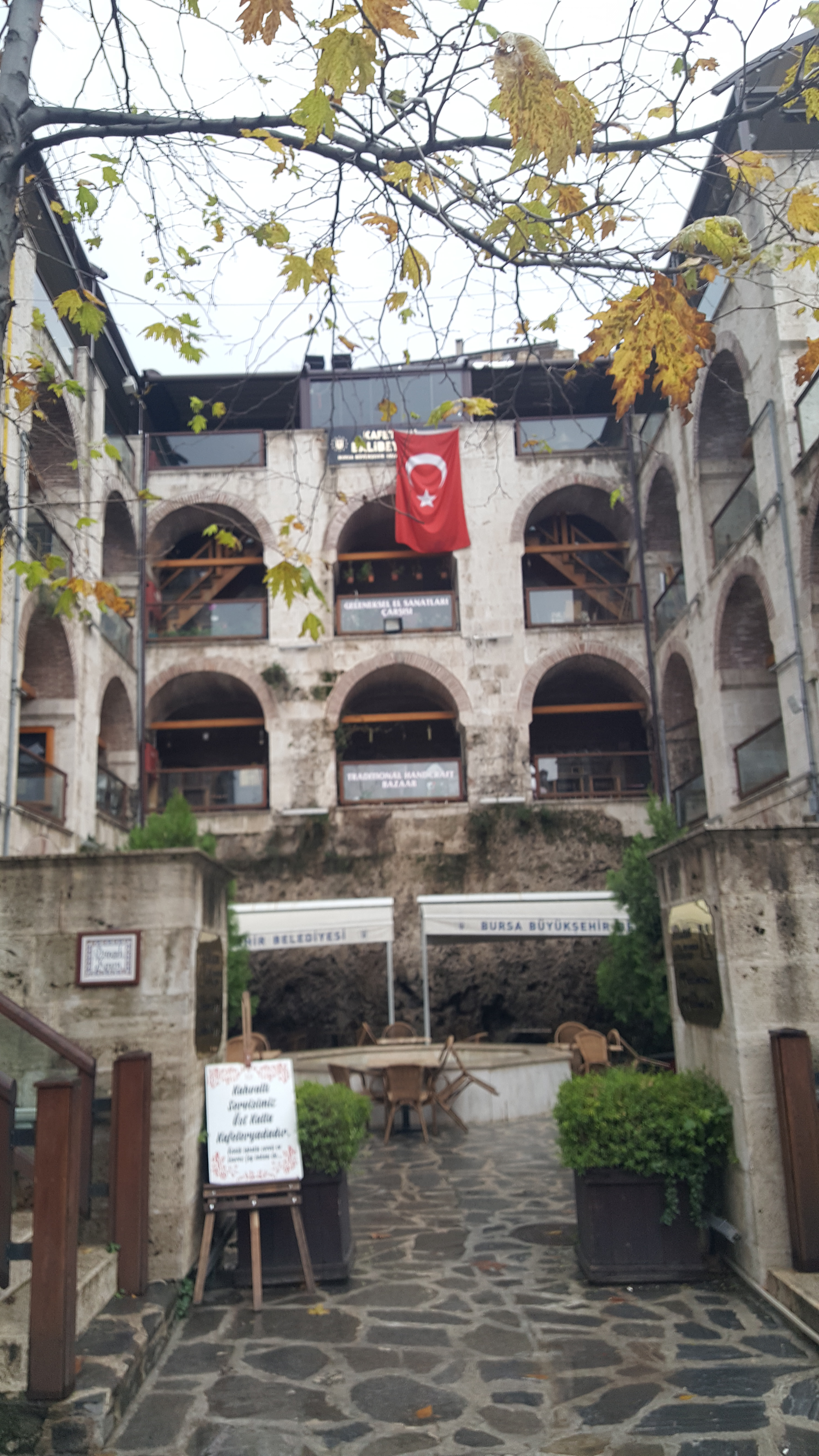 Bali Bey Han, Bursa